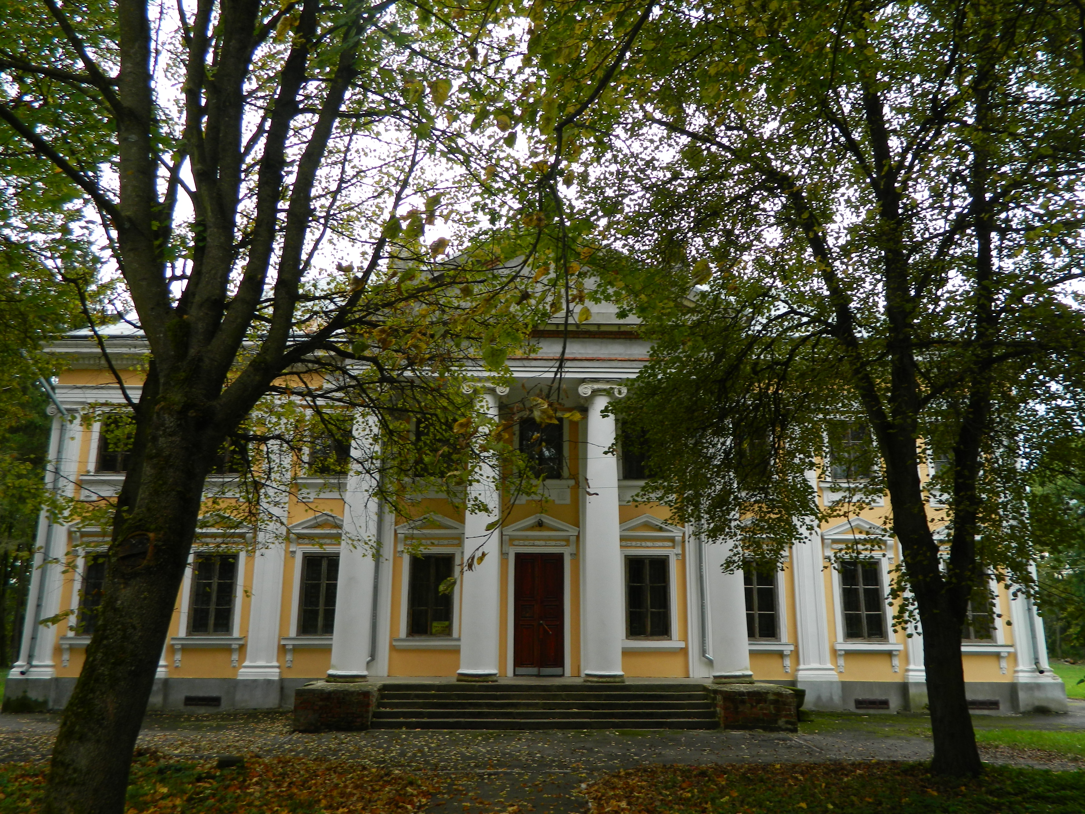 Флiгель садиби Корецьких (мур.), Млинів, вул.I.Франка, 1б